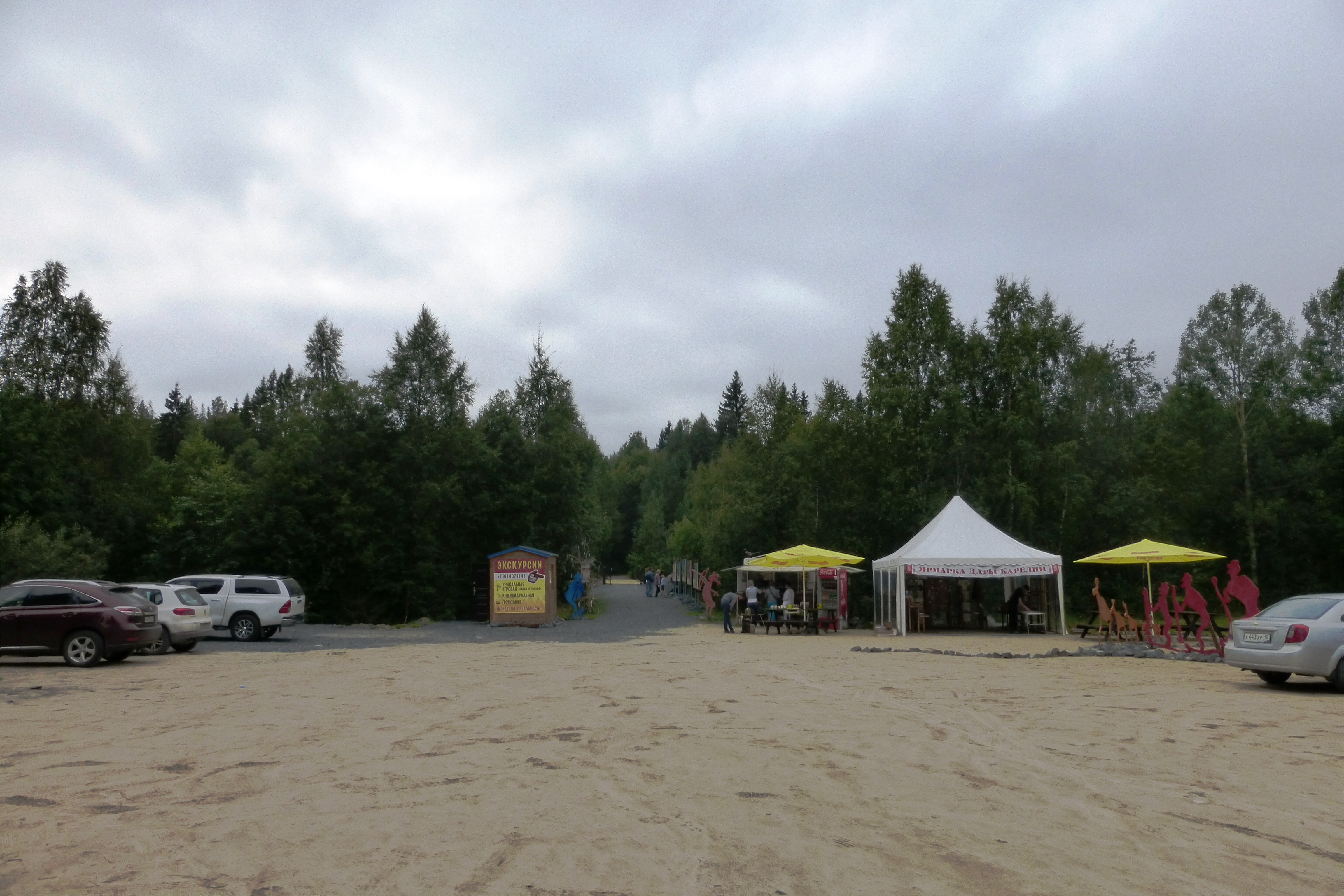 Автостоянка. Начало пешеходной тропы (1300 метров) к расположению петроглифов . Беломорский район, Республика Карелия.